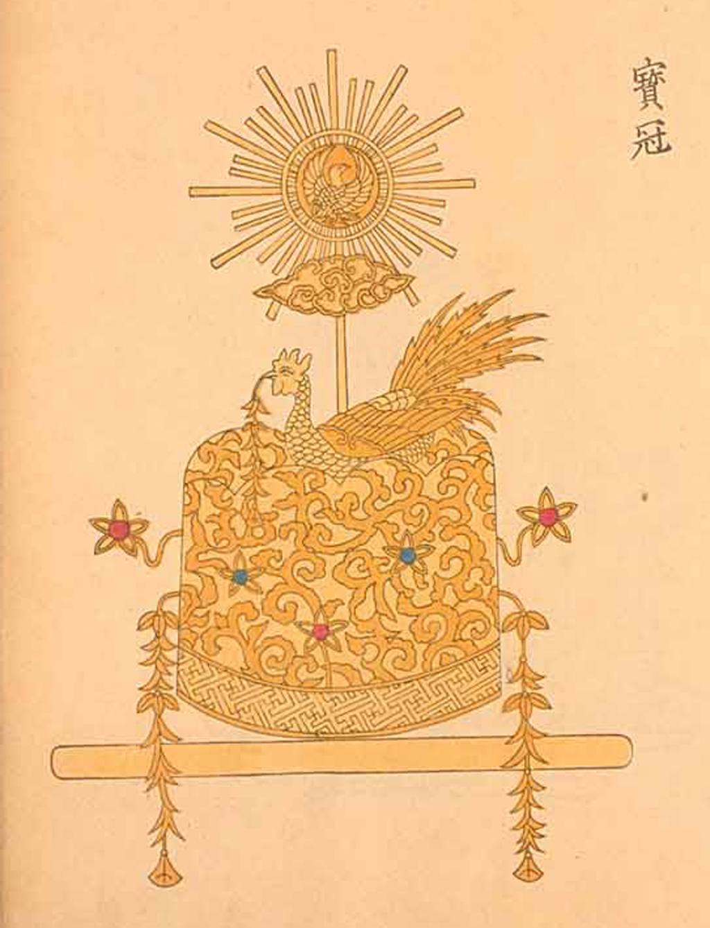 宝冠（女性天皇の冠））